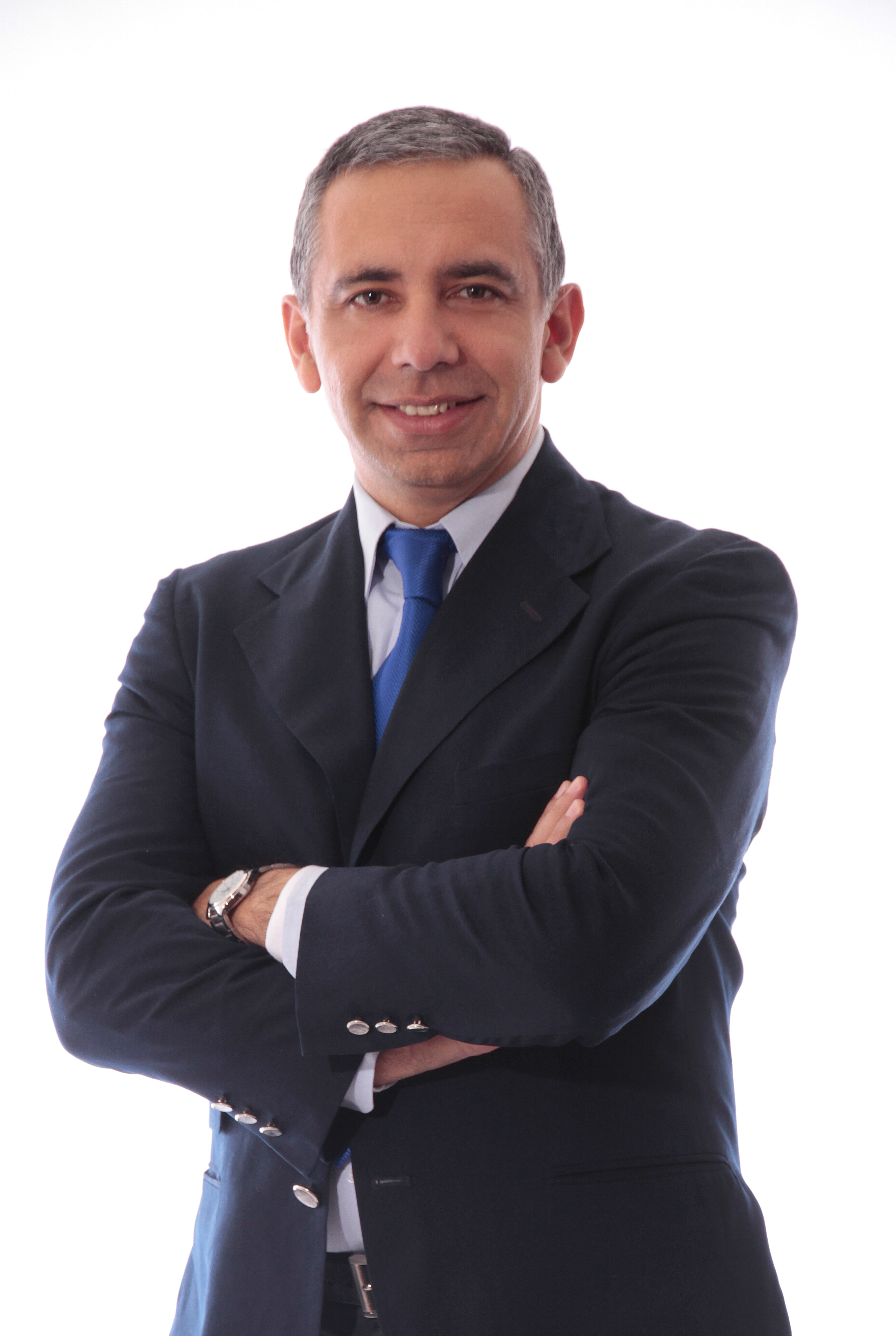 Víctor Hugo Figueroa Rebolledo, Alcalde de Penco